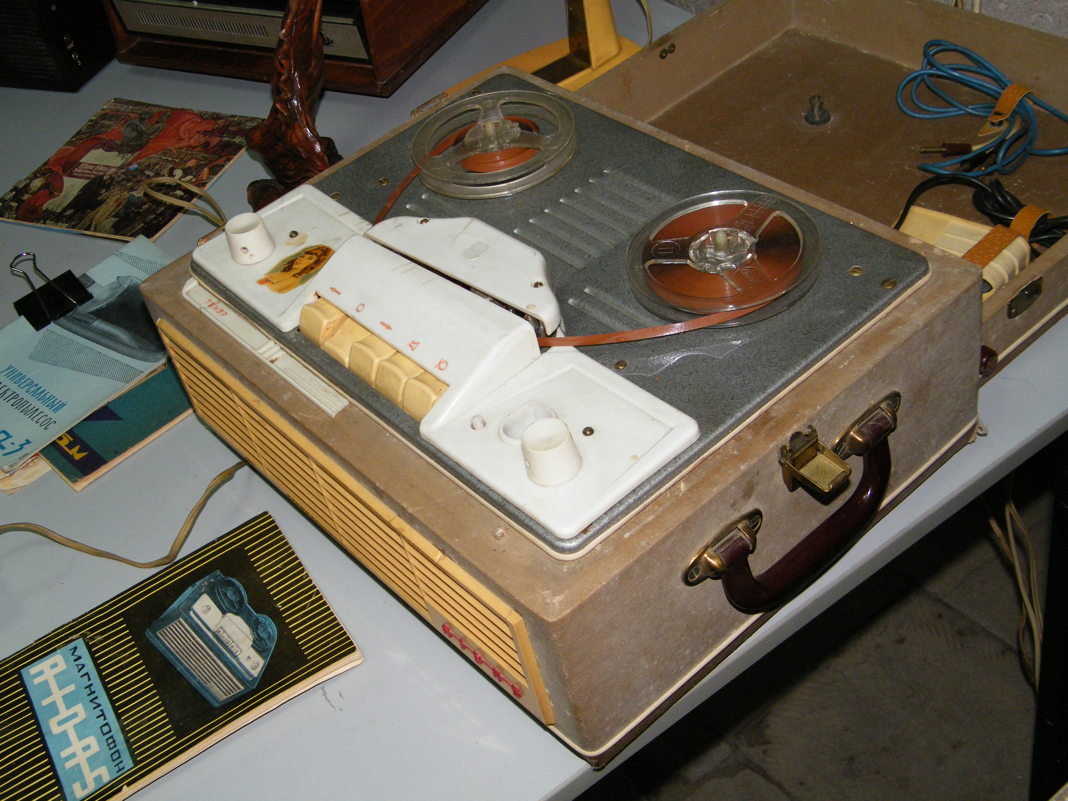 Магнитофон "Айдас" ("Эльфа-20"), 1962